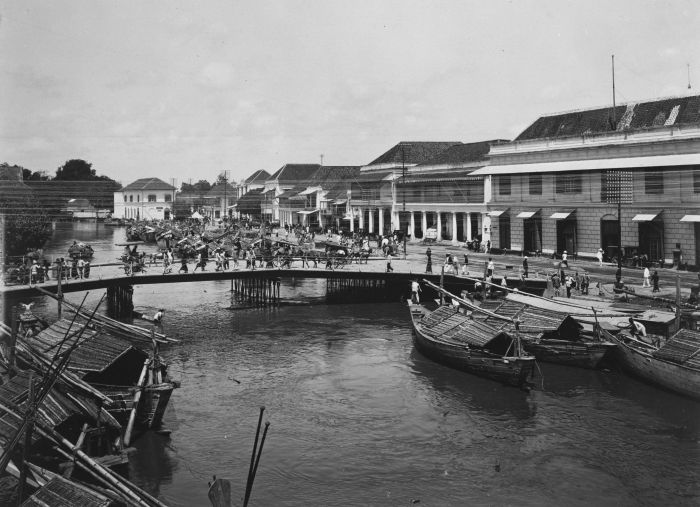 Jembatan Merah, Surabaya